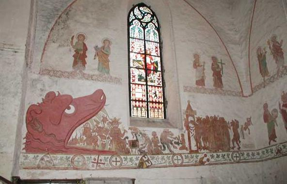 Chor-Nordwand der Kirche Behrenhoff, links ein gewaltiger Höllenrachen mit Reißzähnen, in den mehrere Sünder stürzen, davor thront der gekrönte Höllenfürst mit Zepter und Blitzen in den Händen. Links unter dem Fenster schöpft eine Frau Wasser aus einem Fass und wird durch eine Hängevorrichtung am Trinken gehindert, während ihr ein Teufel siedende Flüssigkeit über den Kopf gießt. in der Mitte unter dem Fenster muss ein Mann auf einem glühenden Amboss sitzen. Rechts unter dem Fenster wird ein kniend um Gnade Flehender wird von einem Teufel mit einem Saiteninstrument traktiert. Unten rechts: Höllenqualen: ein Dämon zerrt eine Schar Verdammter durch ein zinnenbewehrtes Tor, darunter ein König, ein Bischof und zwei Mönche.